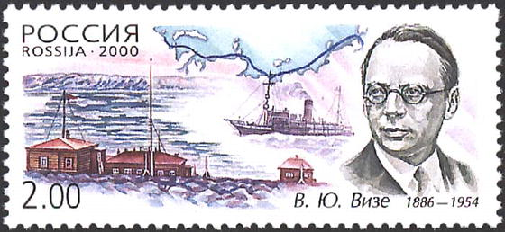 Timbre russe en l'honneur de Vladimir Vize (1886-1954)